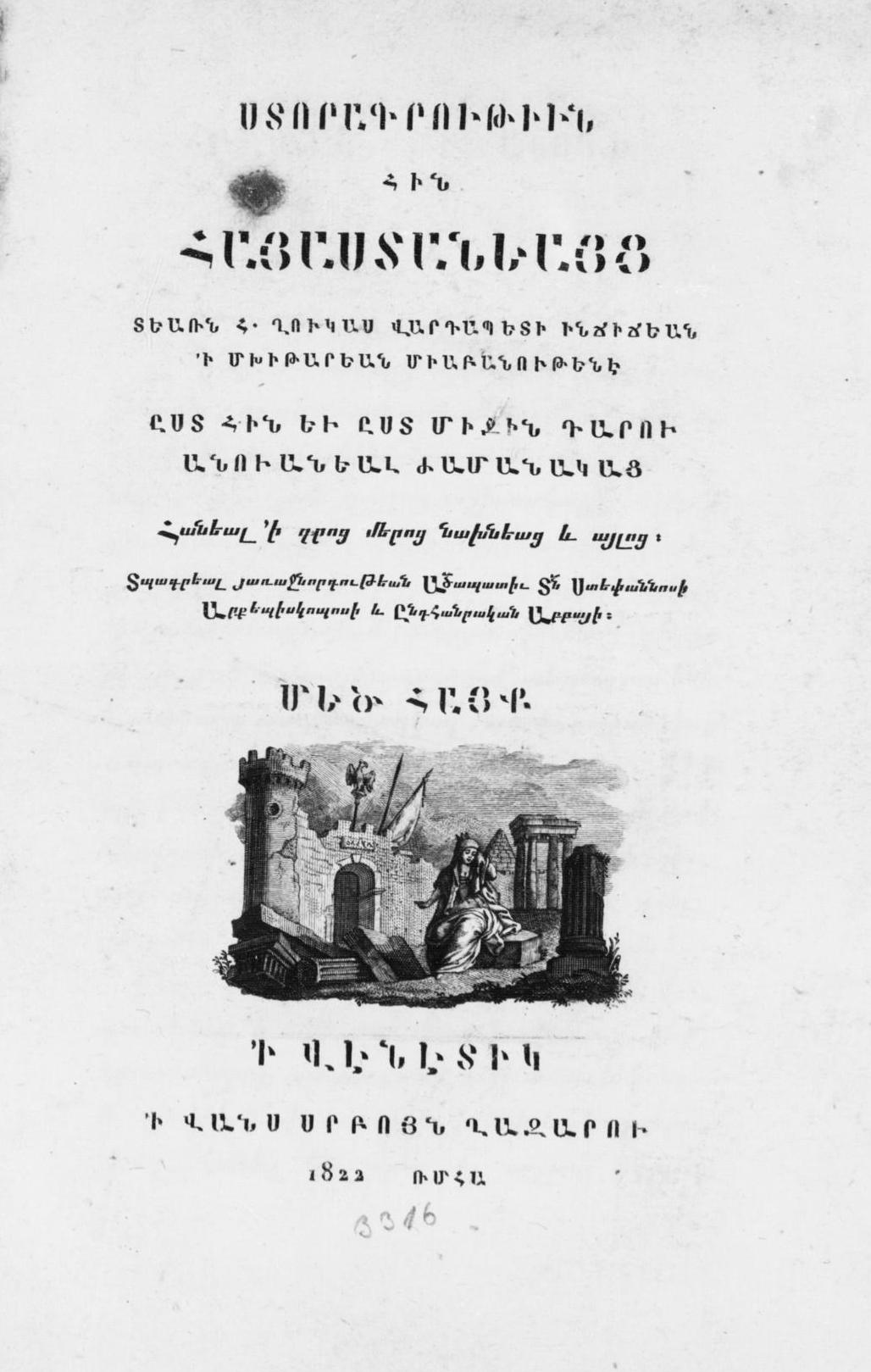 Ստորագրութիւն հին Հայաստանեայց (Description of Ancient Armenia)